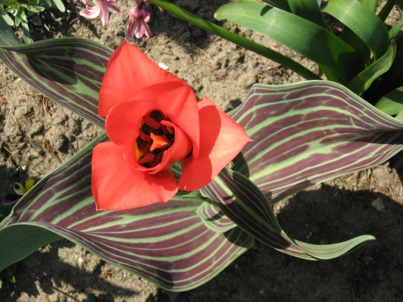 Tulipan Greiga (Tulipa greigii Regel) z mojego ogrodu